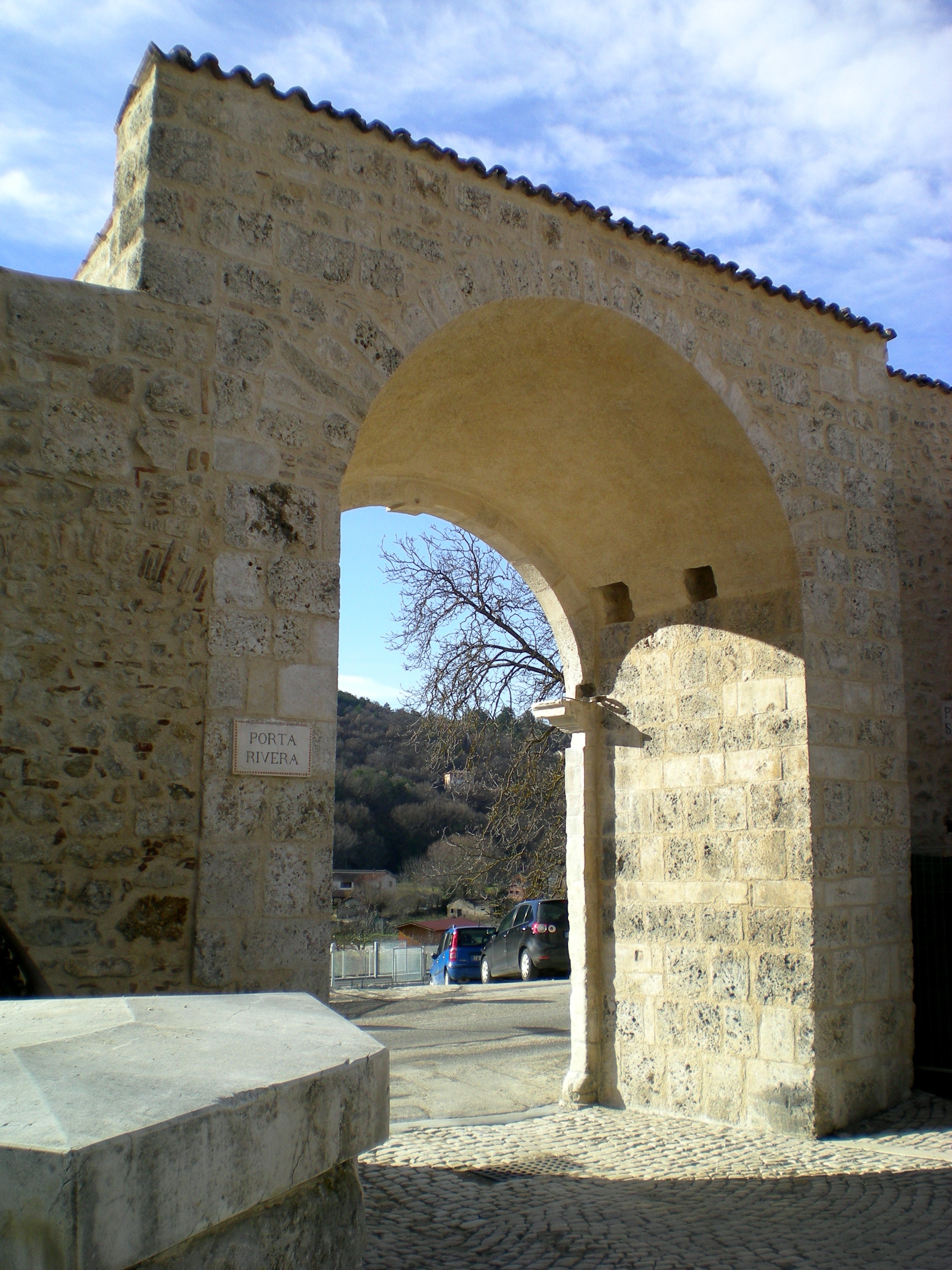 Porta Rivera (L'Aquila): vista interna nei pressi della fontana delle 99 cannelle